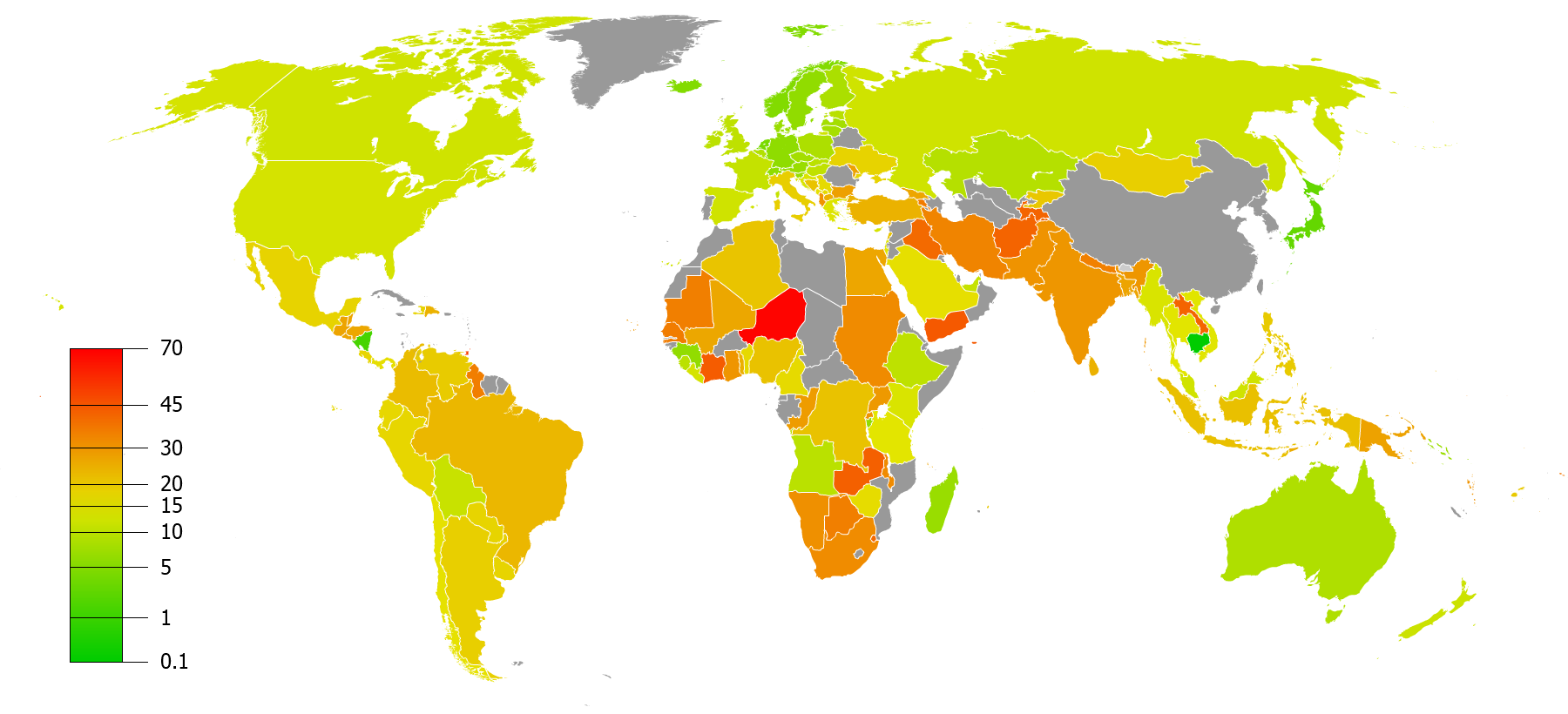 ILOデータによる15～24歳層の女性ニート比率（最新年度）